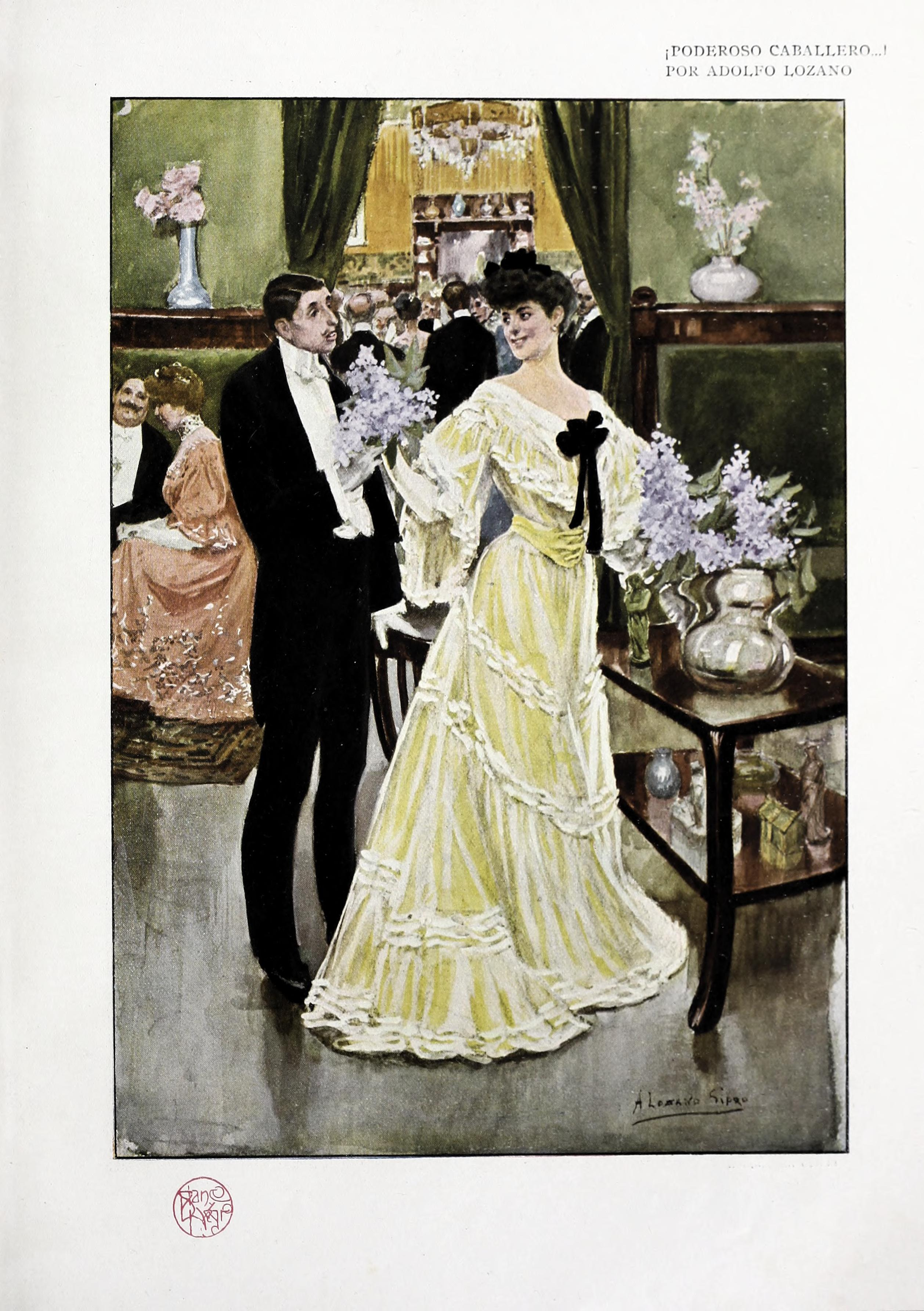 Poderoso caballero.